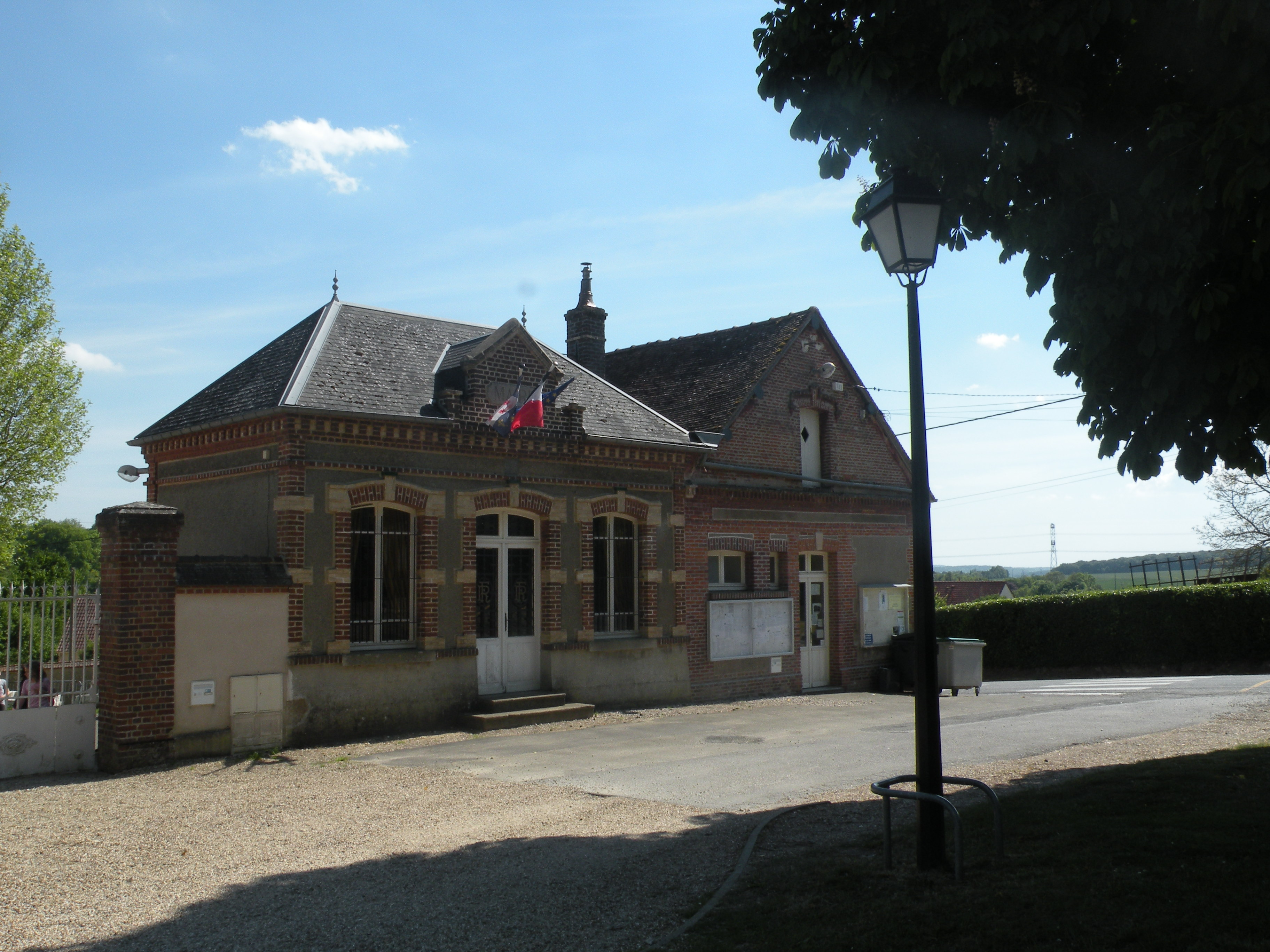 Le Vaumain maire